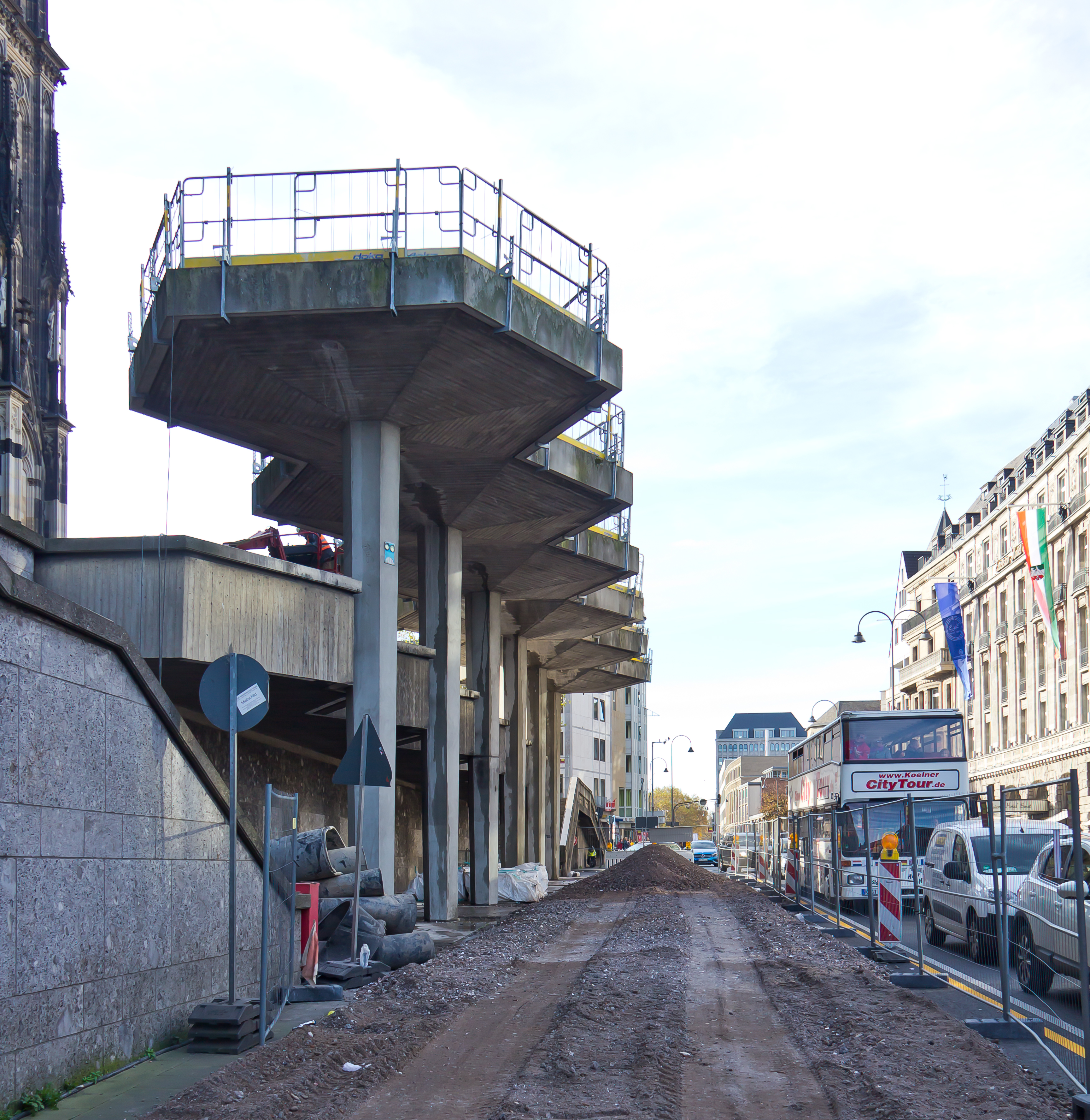 Vorbereitungen zu den Abbrucharbeiten. Die „Dompilze“ genannte Konstruktion gehörte zur Bushaltestelle „Dom/Hbf“ an der Trankgasse, nördlich angrenzend an die Domplatte (offizieller Straßenname: Domkloster). Architekt: Fritz Schaller, errichtet 1968.